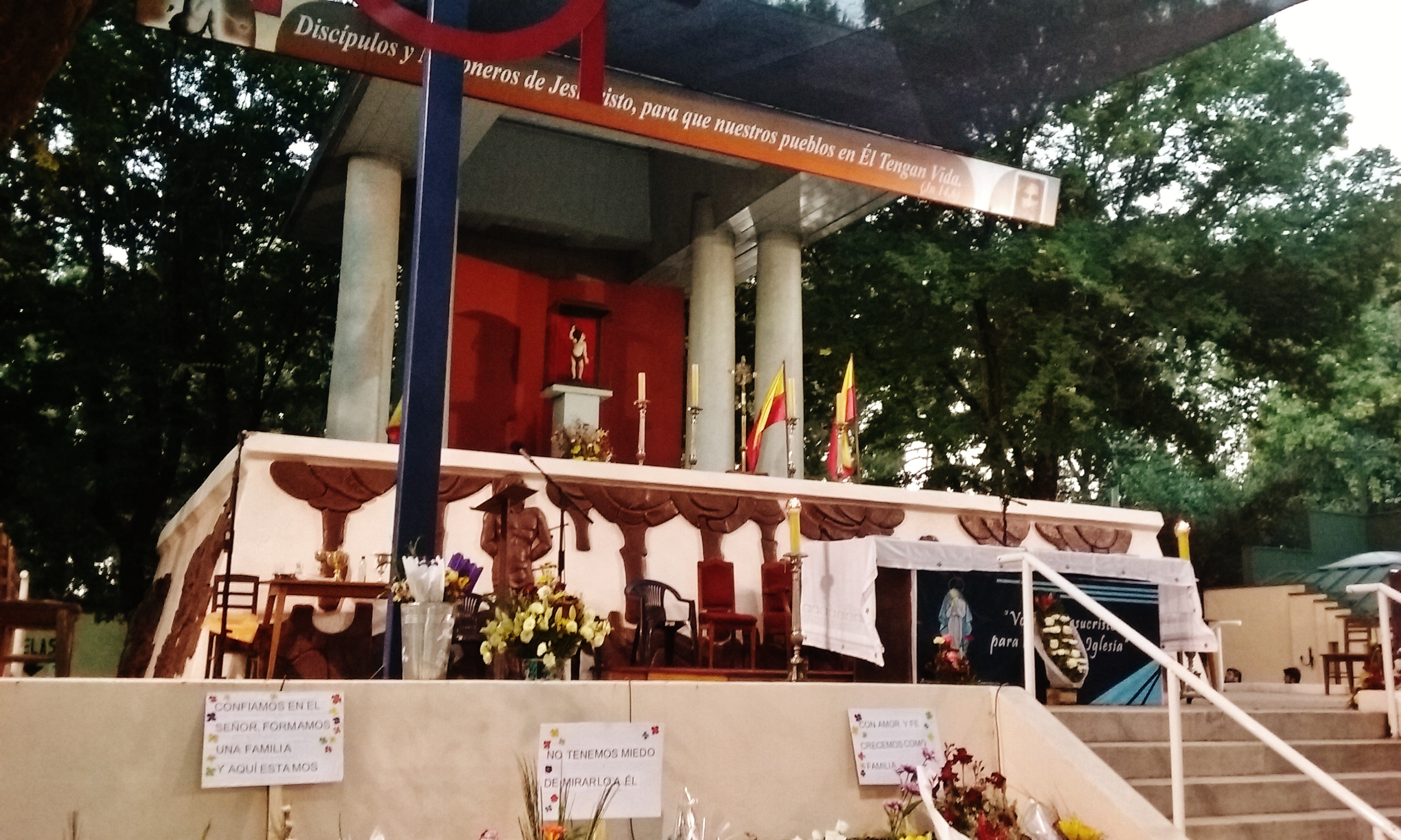 Tradicional celebracion religiosa de San Sebastian de Yumbel.